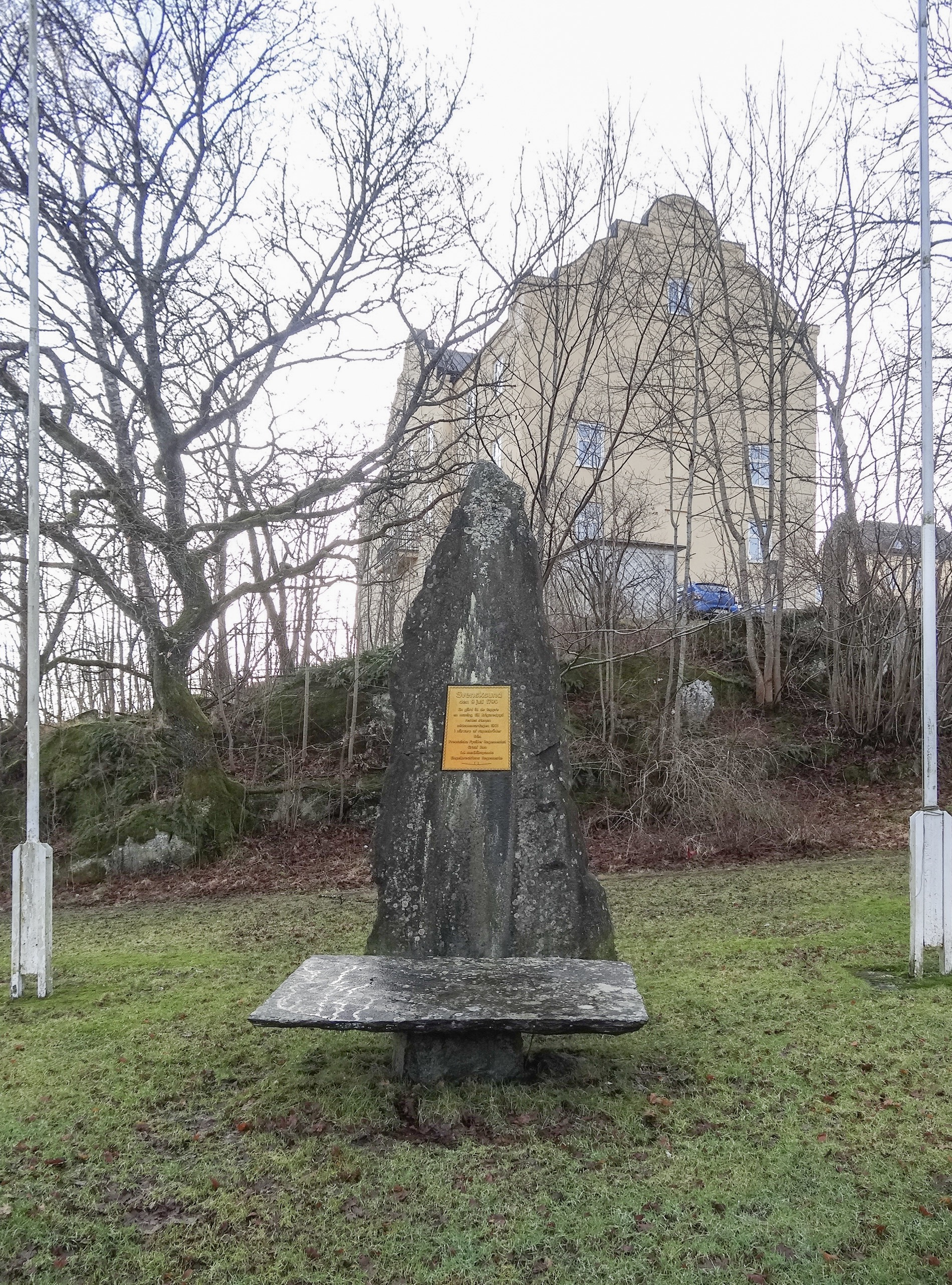 Minnessten över slaget vid Svensksund 1790, i regementsparken i Uddevalla. I bakgrunden tidigare regementet I17:s gamla kanslibyggnad.